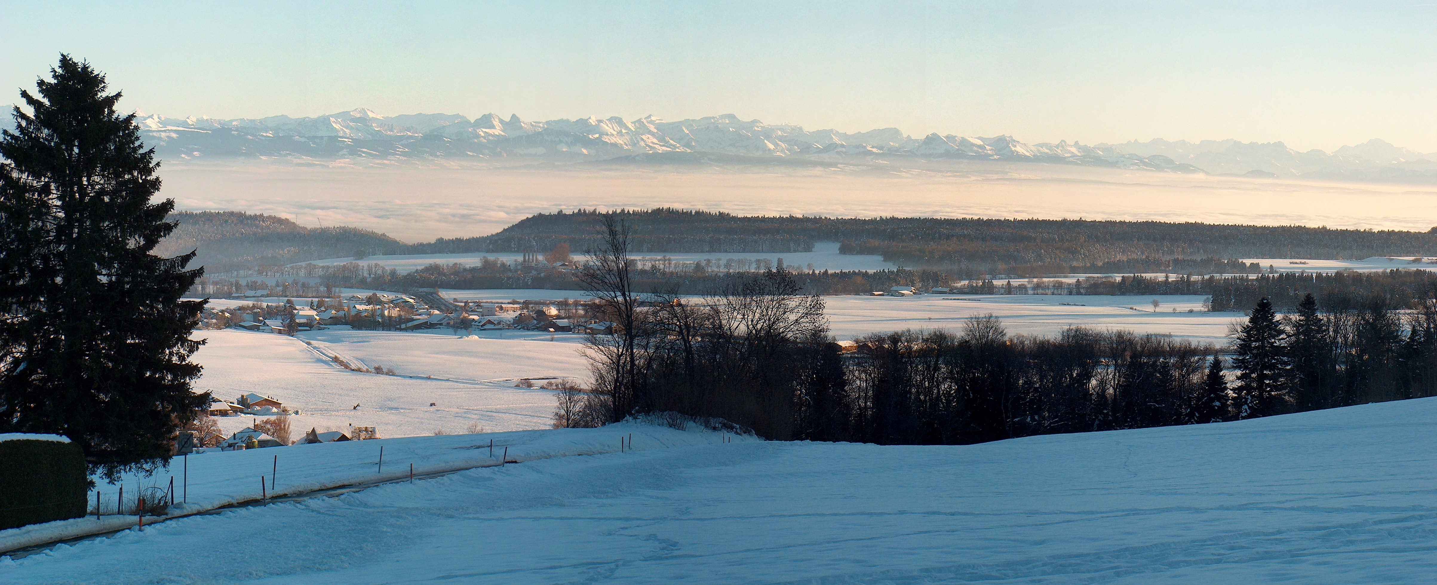 Vue sur les Alpes